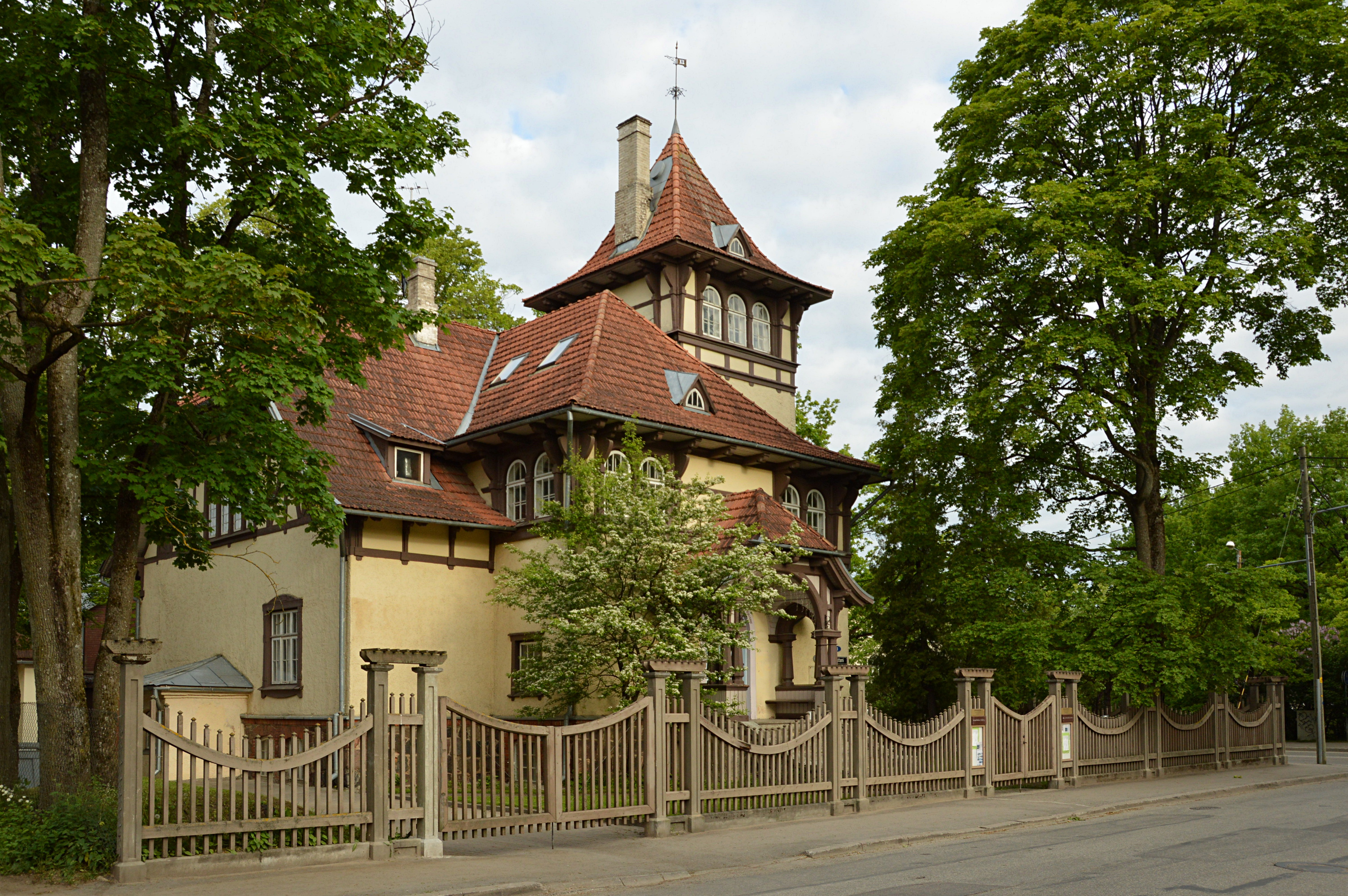 Tartu Saksa Kultuuri Instituut